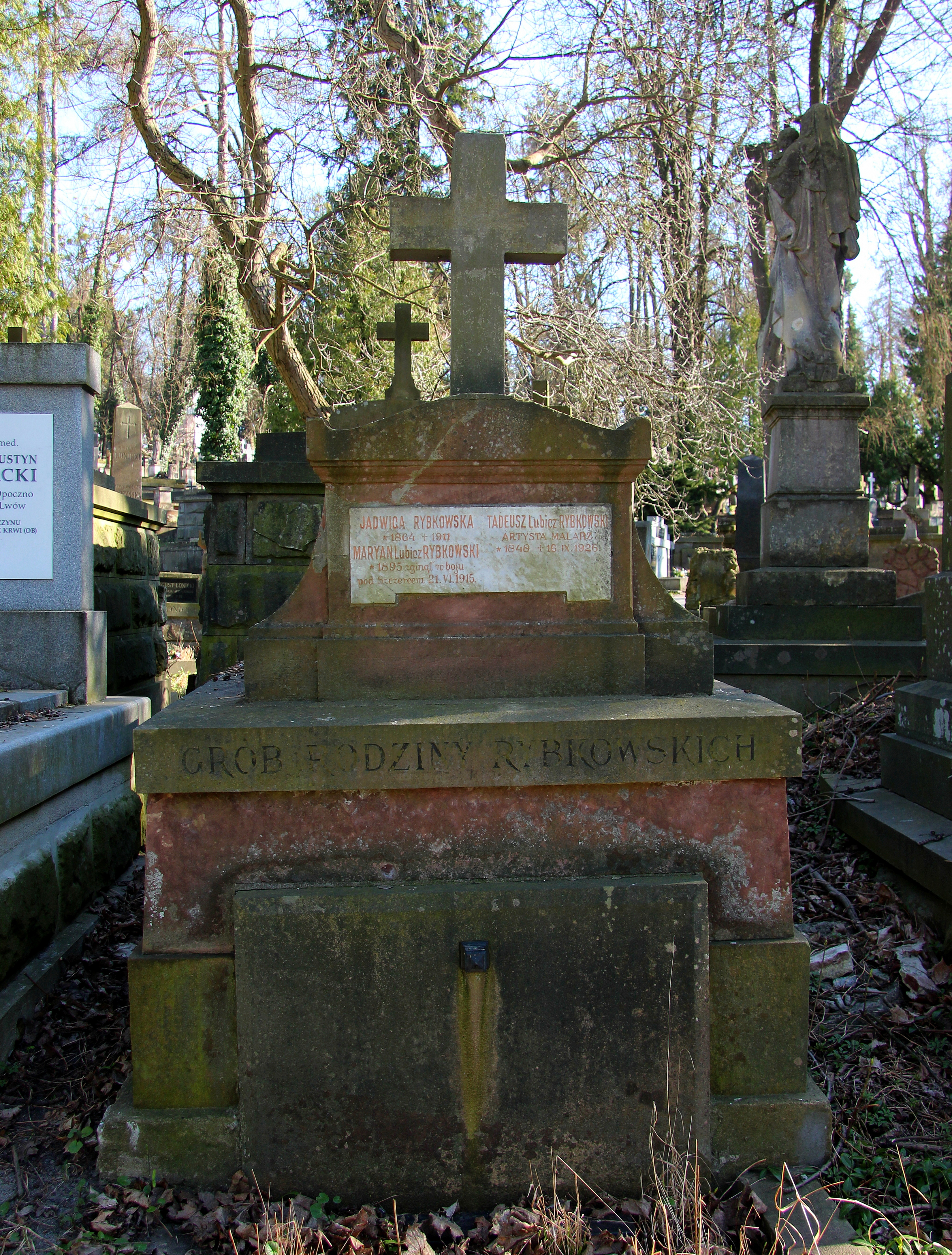 Гробниця Рибковських. Личаківський цвинтар , поле № 59.